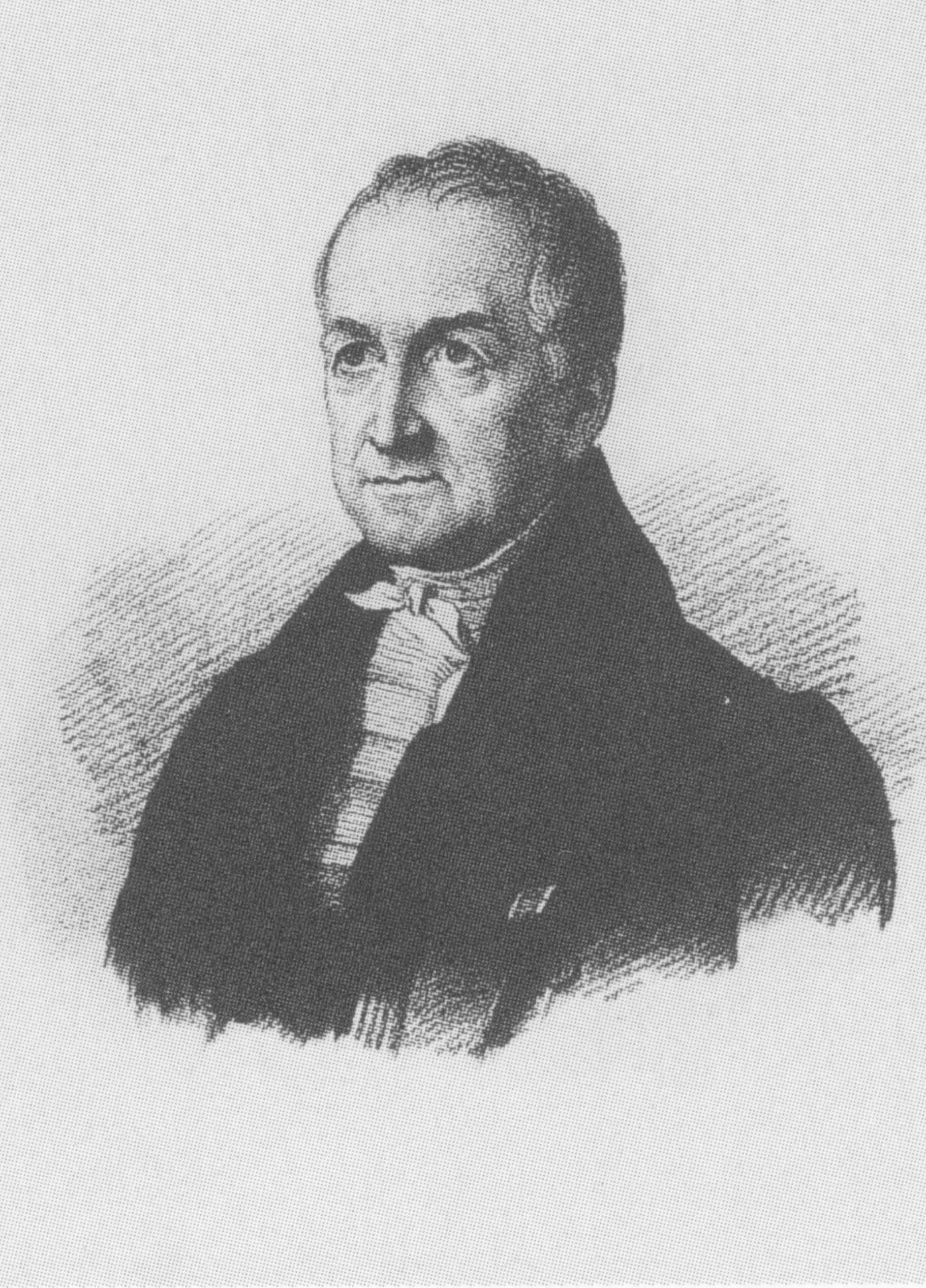 Porträt von Christian Gottlob Großmann (1783–1857), deutscher evangelischer Theologe, Superintendent von Leipzig